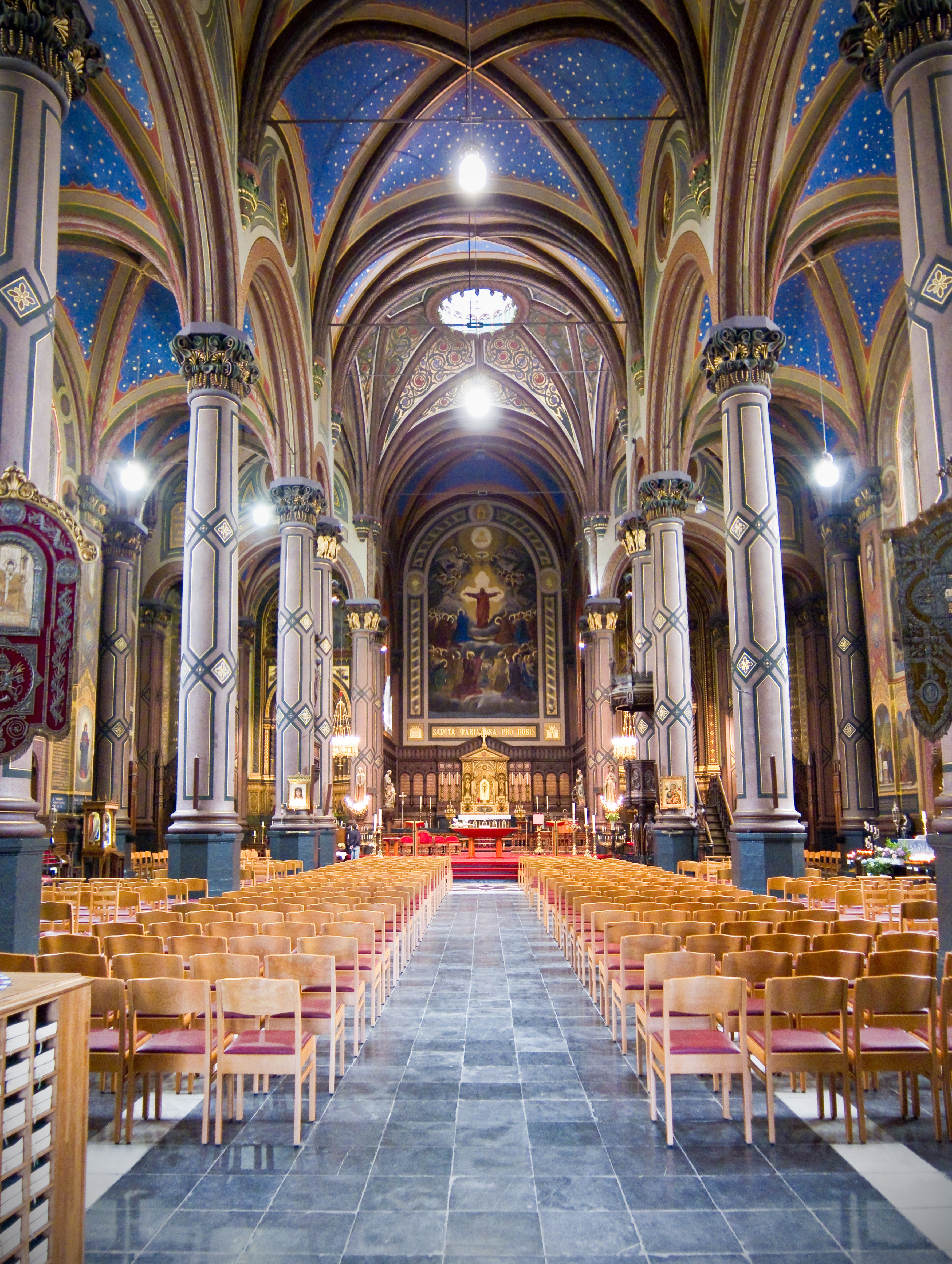 Interieur van de Onze-Lieve-Vrouw-van-Bijstand-der-Christenenkerk in Sint-Niklaas (België).